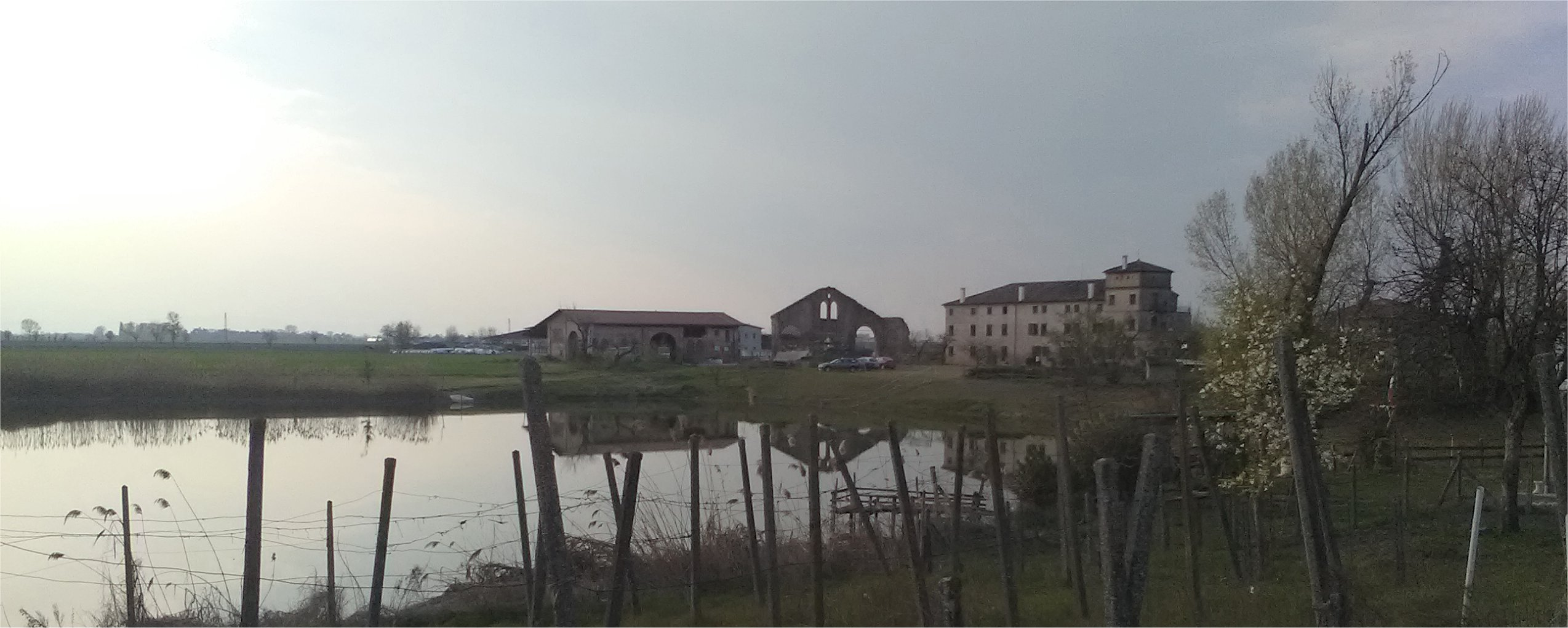 Gorgo Gàspera a Trecenta (Rovigo)